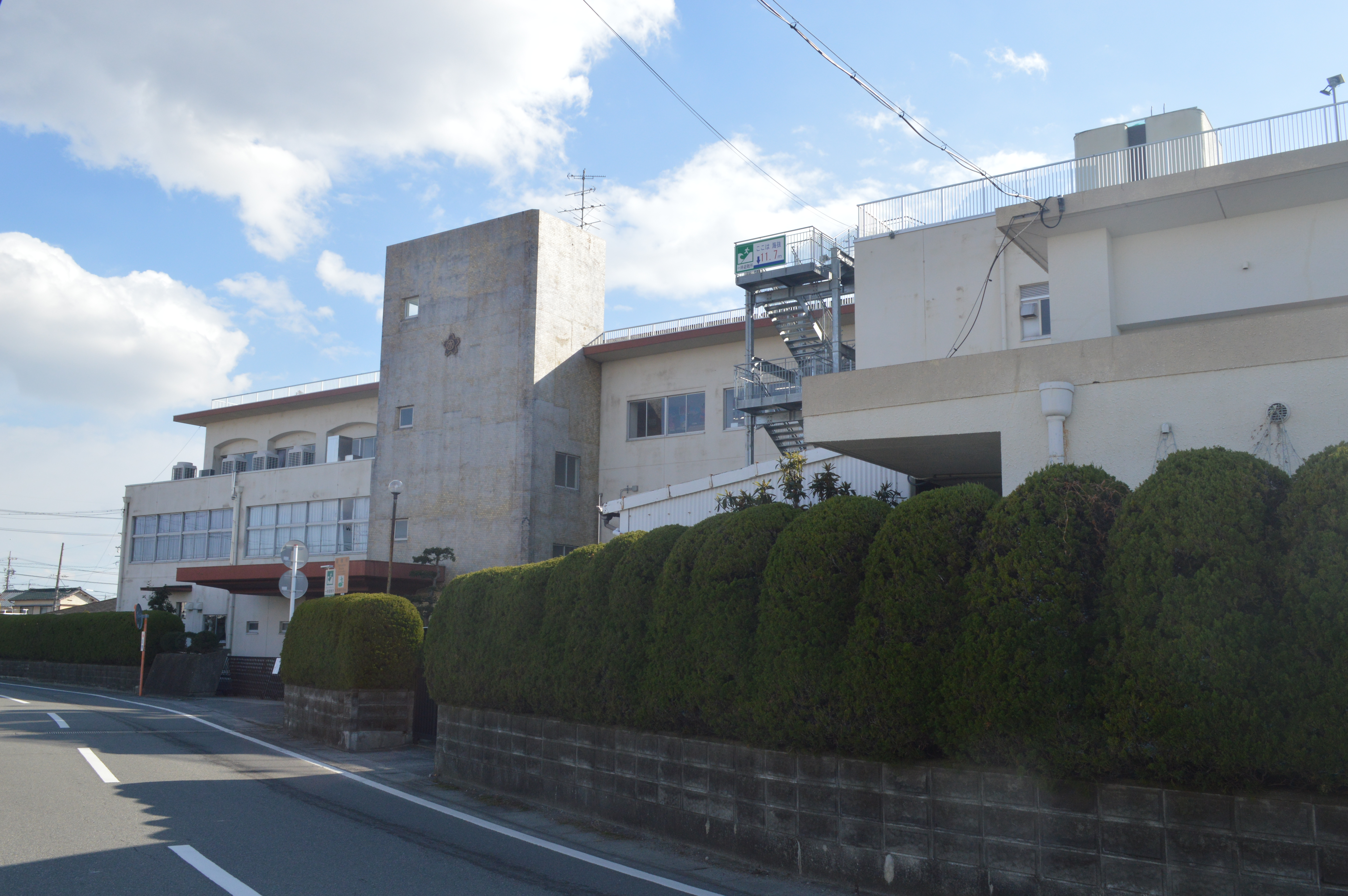 三重県桑名郡木曽岬町の木曽岬町立木曽岬小学校。